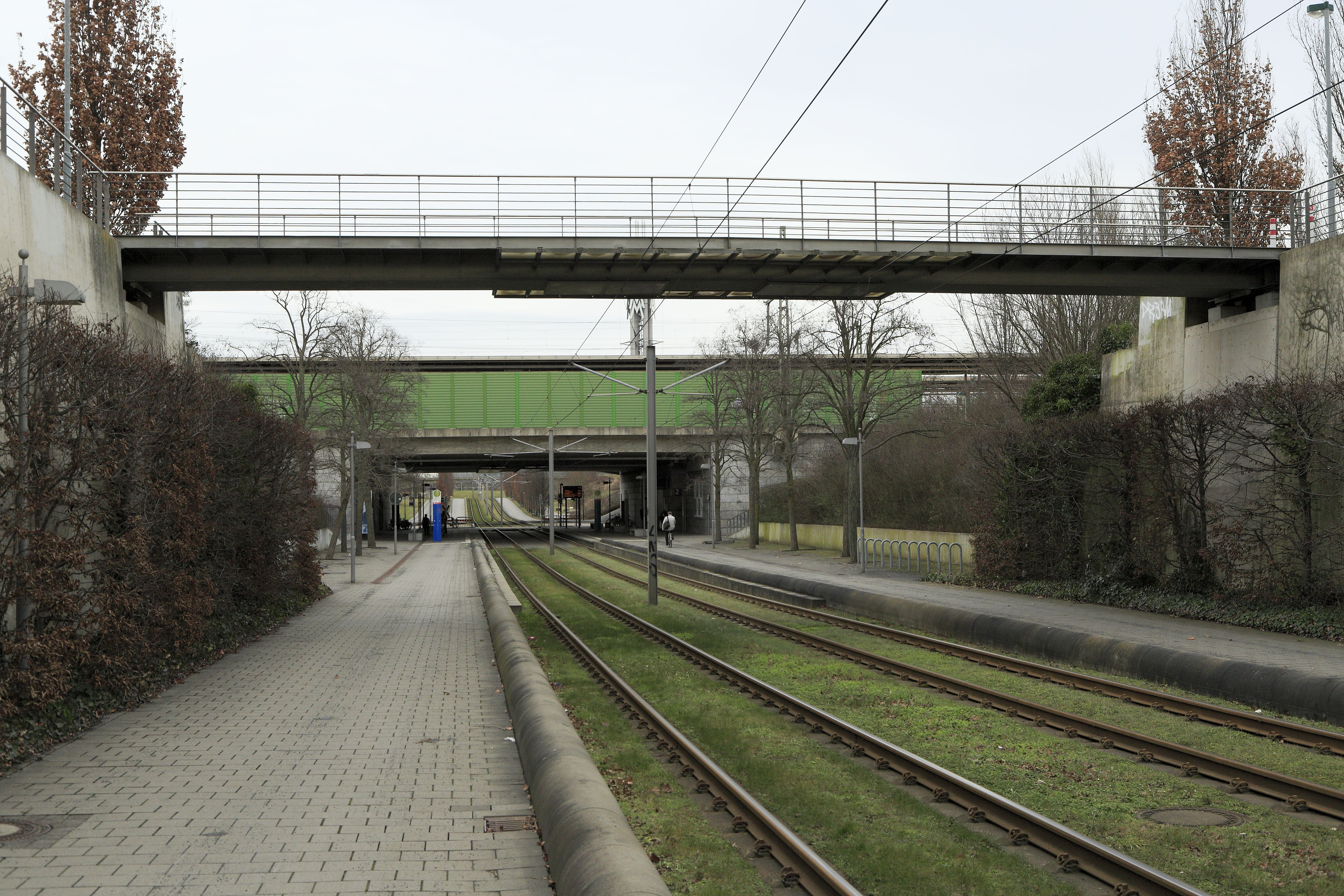 Von Wiederitzsch Richtung Messegelände, auf der rechten Seite der Fußgängerbrücke liegt ein allerdings wenig genutzter Pendlerparkplatz.